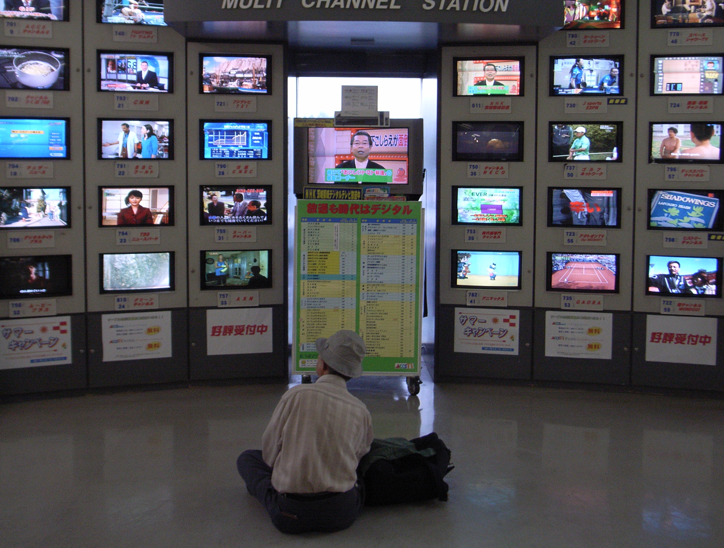 ACCSTV 研究学園都市コミュニティケーブルサービス